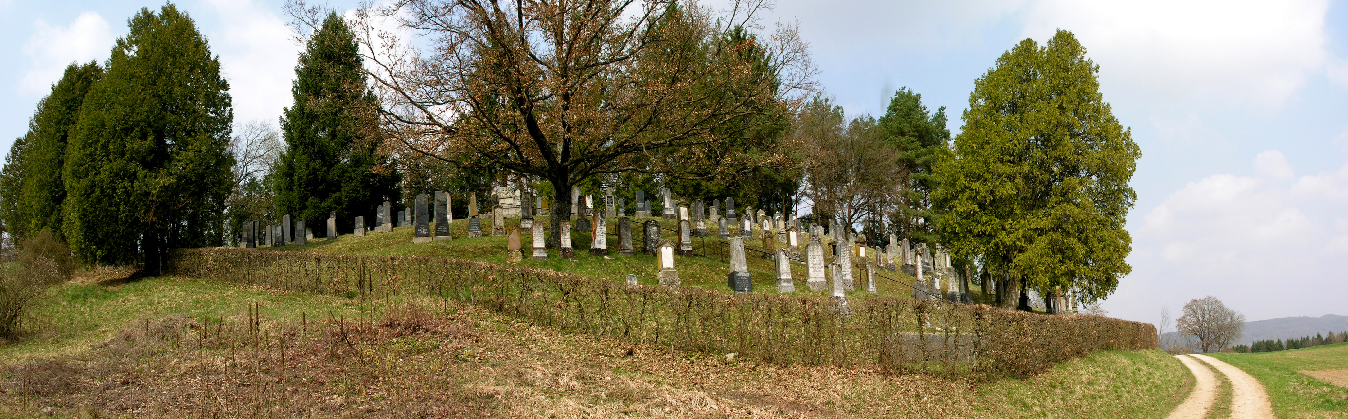 Germany, Baden-Württemberg, Jewish Cemetry in Randegg